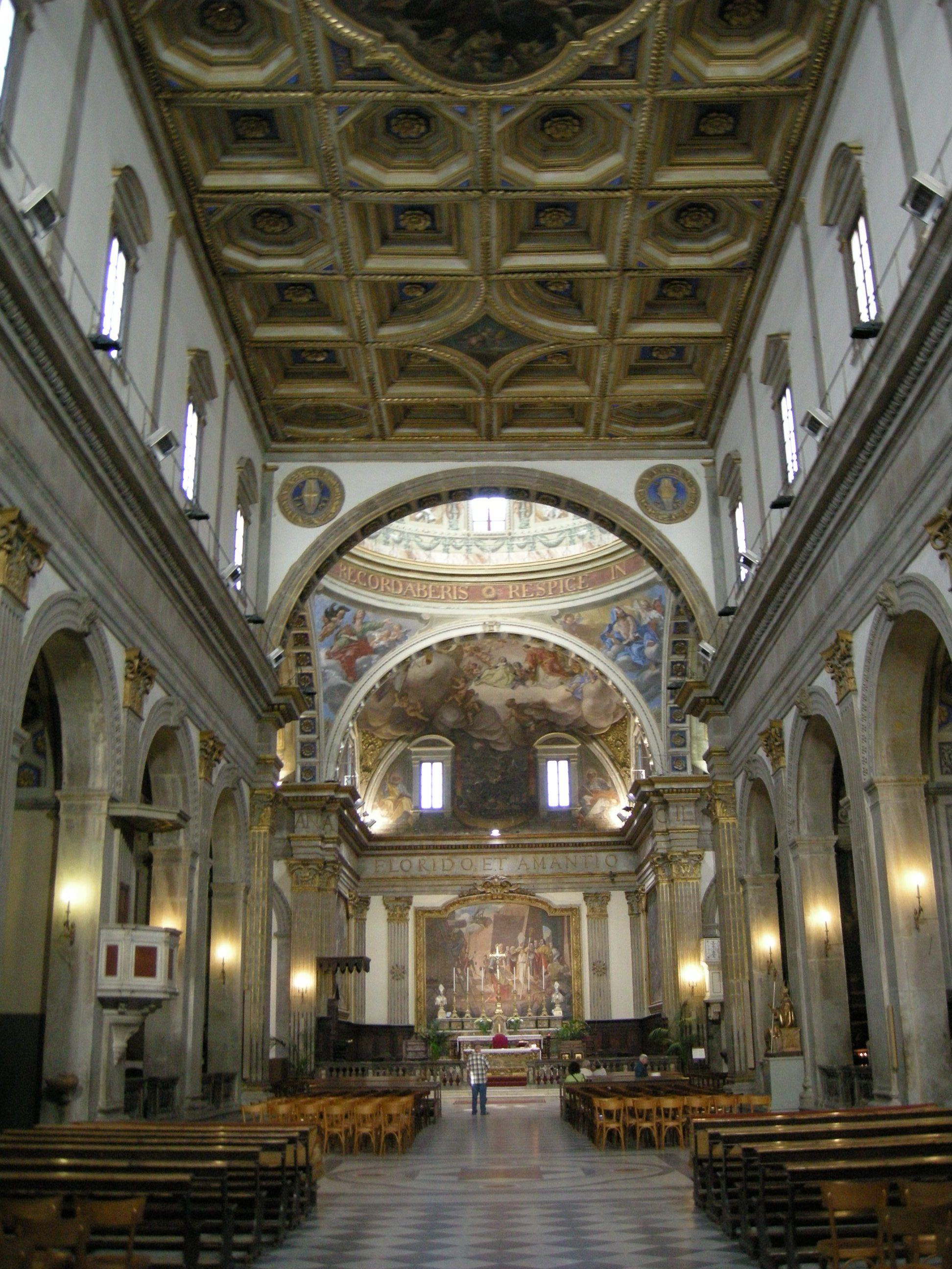 Città di castello, duomo, interno